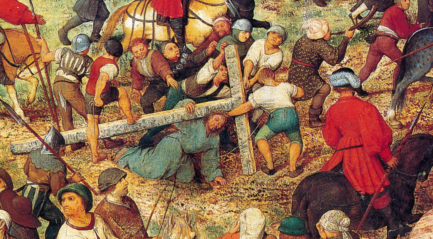 Ausschnitt aus dem Gemälde Die Kreuztragung Christi